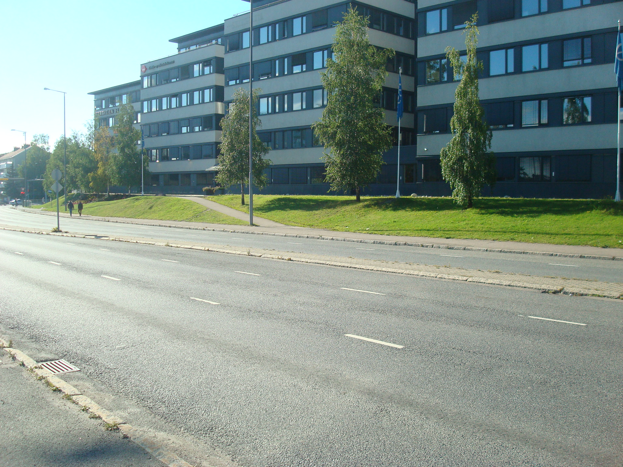 Økernveien ved Hasle (nr. 94).